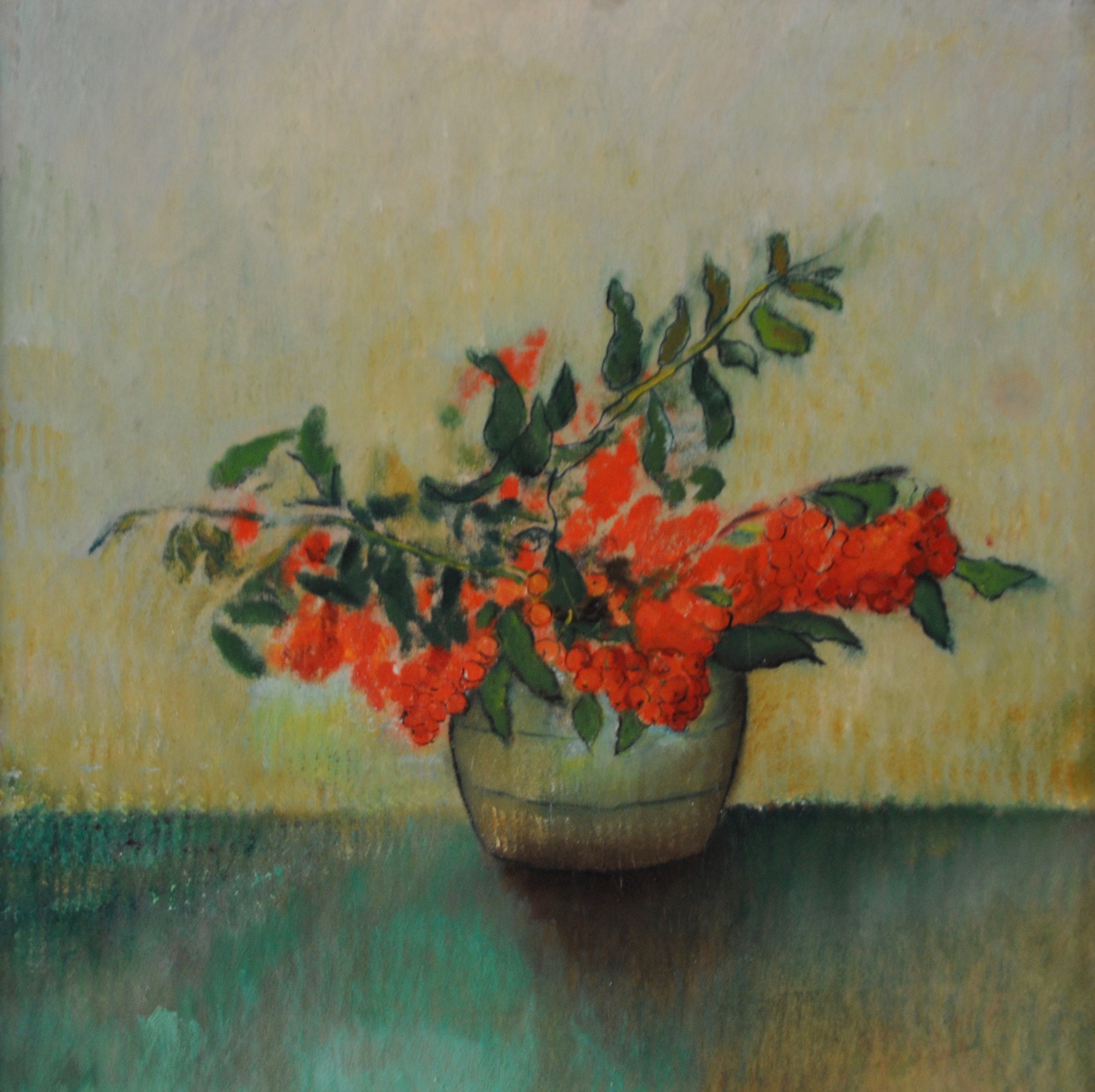 A typical example of the later, more figurative, work of Thijs Rinsema